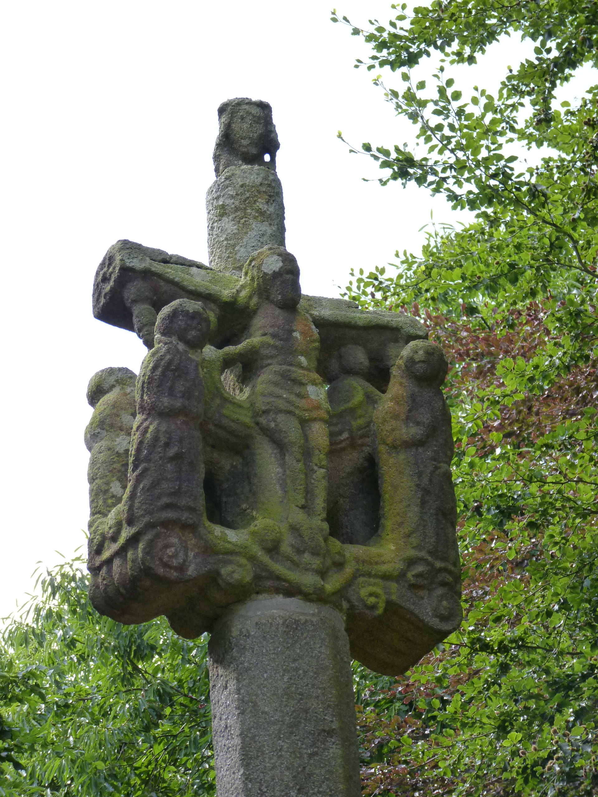 Calvaire du 17ème siècle déplacé au Dourven à Locquémeau et relocalisé à son emplacement d'origine après l'accord du Conseil Général donné en 1977.